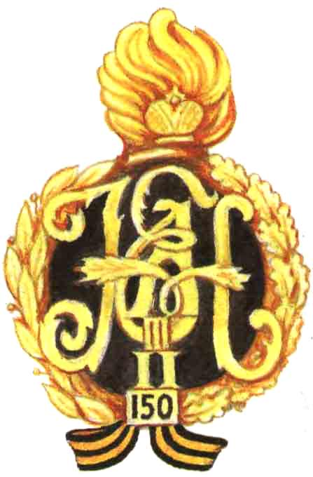 Badge of Ekaterinoslavsky 1-st Grenader Regiment